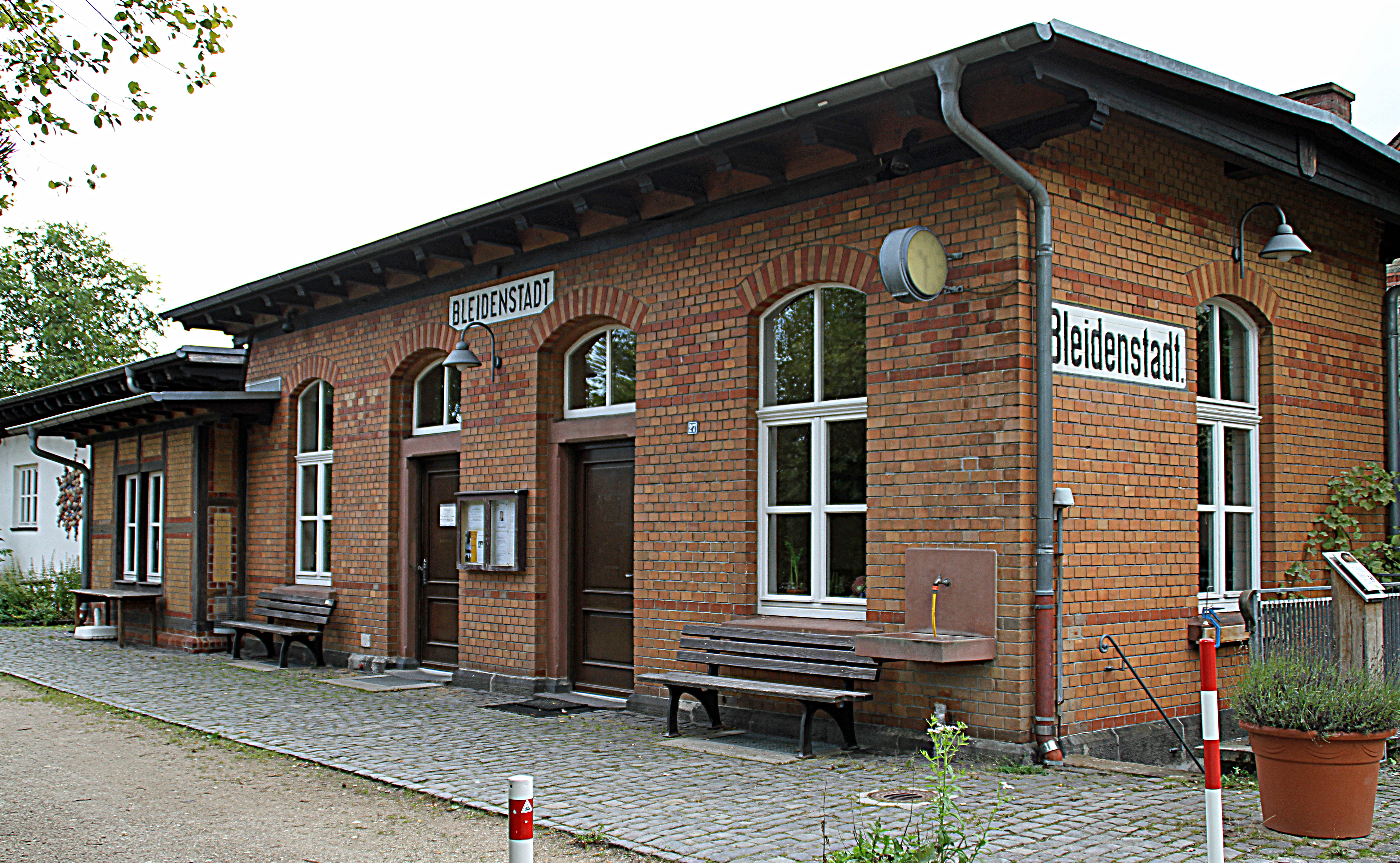 Kirchstraße 20 a